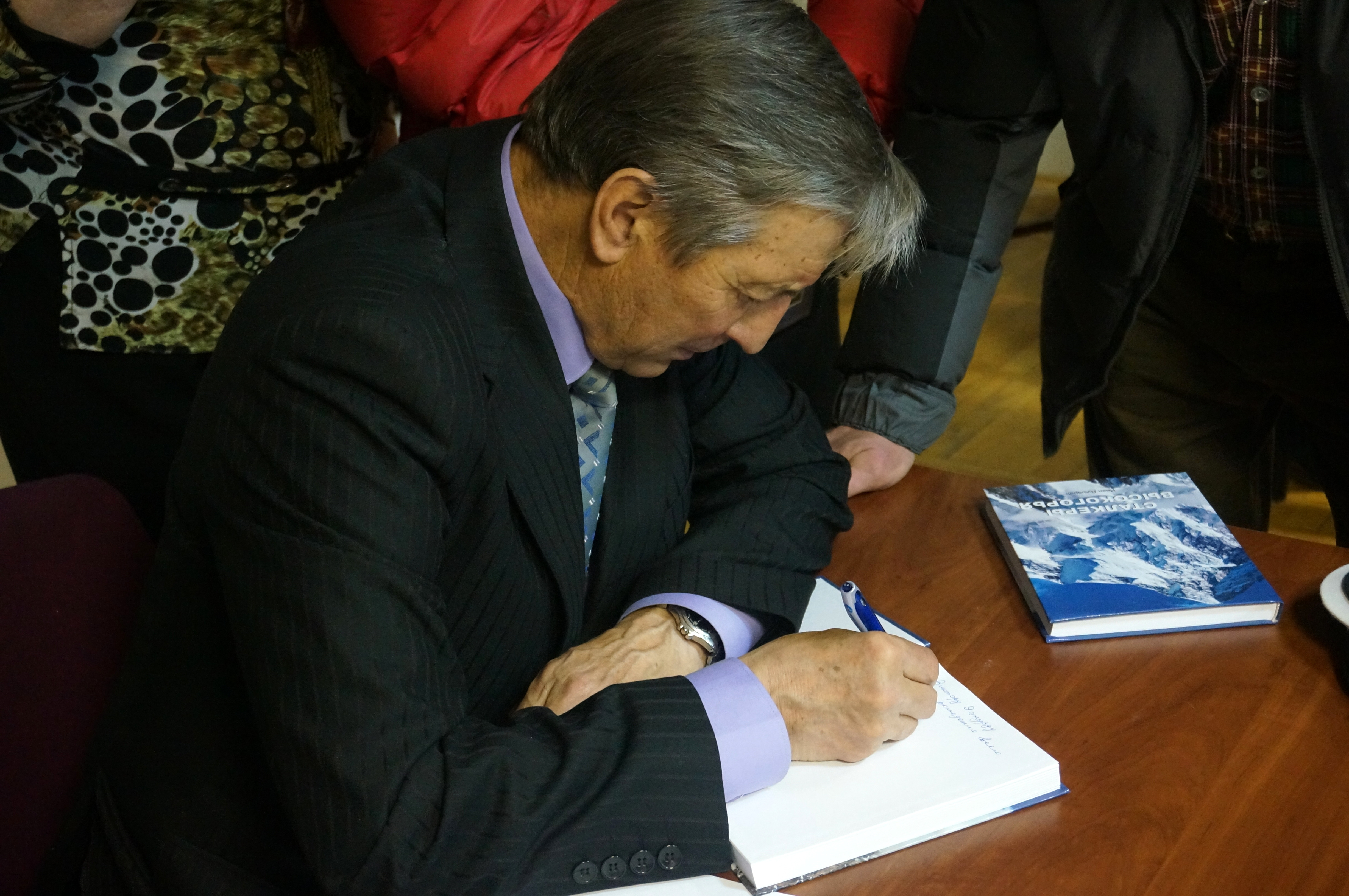 Иван Трофимович Душарин, советский и российский альпинист, вице-президент федерации альпинизма России. Презентация новой книги "Сталкеры высокогорья", Тольятти, 2014